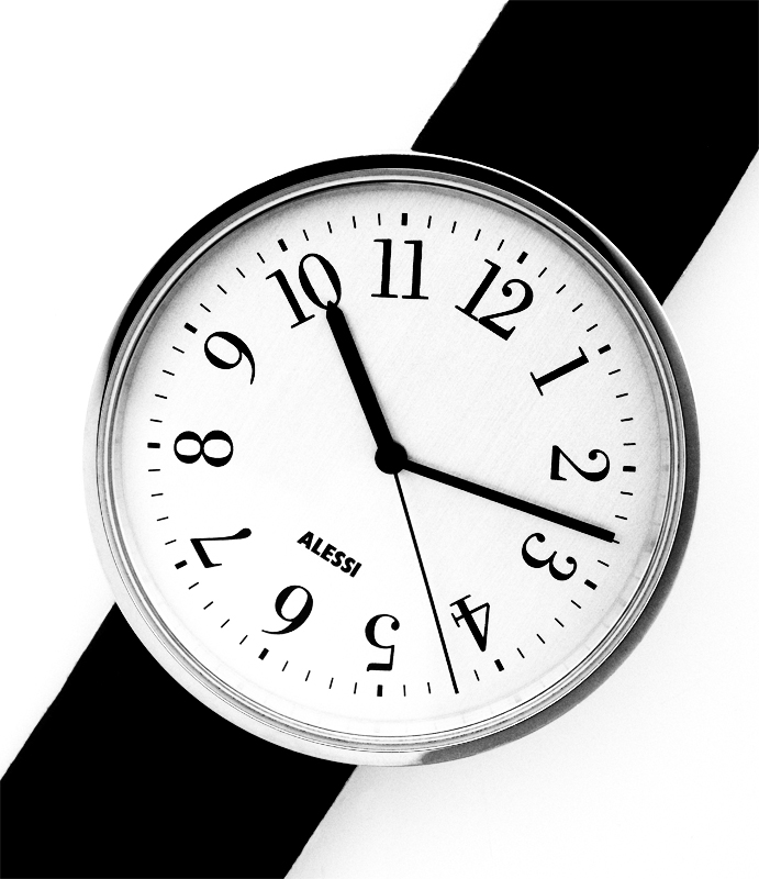 Alessi Watch